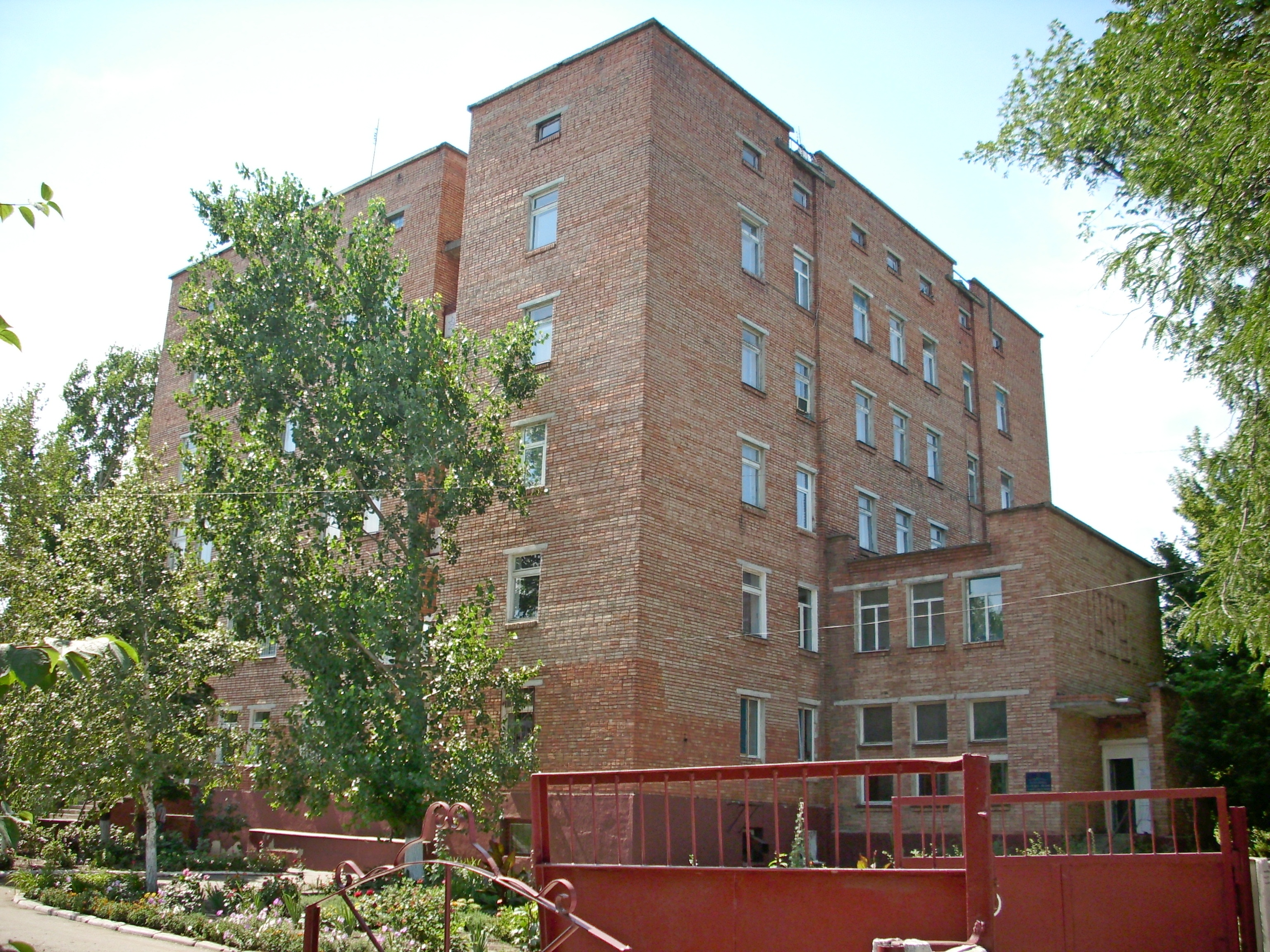 Залізнична лікарня в Роздільній